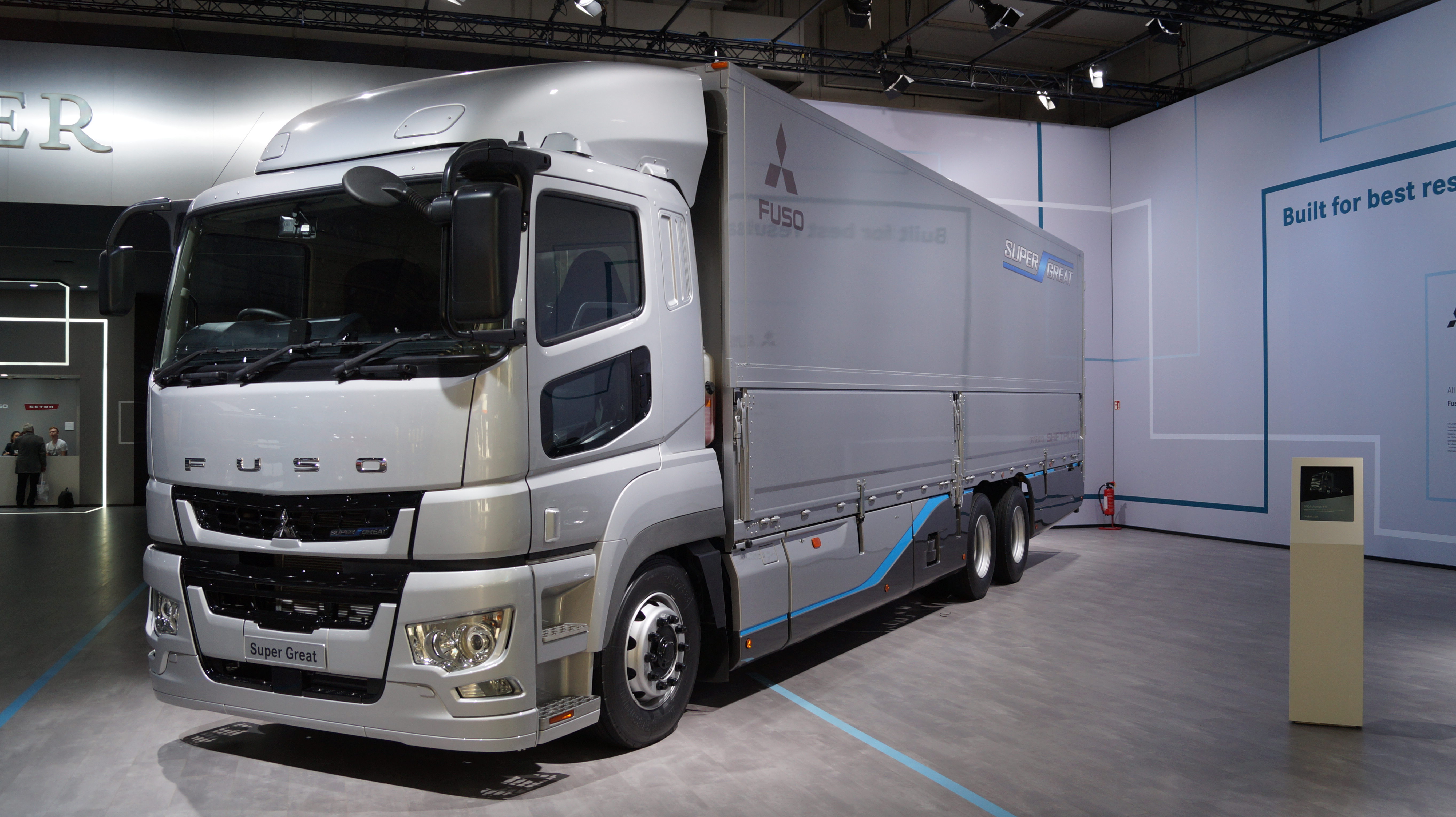 Schrägansicht der Front eines Mitsubishi Fuso Super Great FU 6x2, ausgestellt auf der IAA 2018.